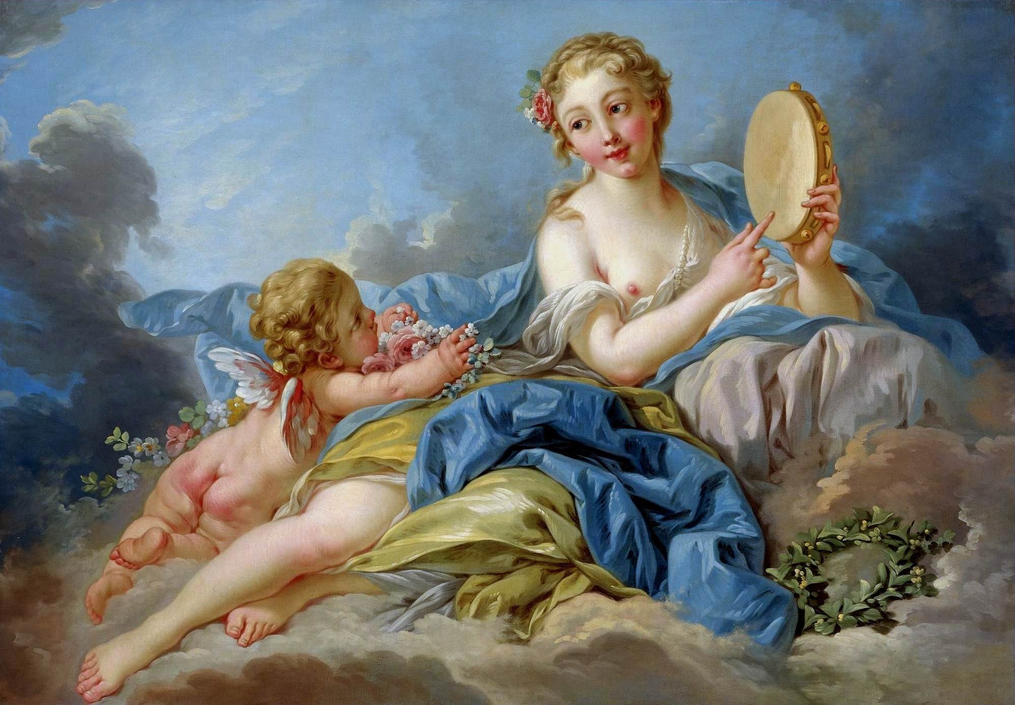 ? × ? cm